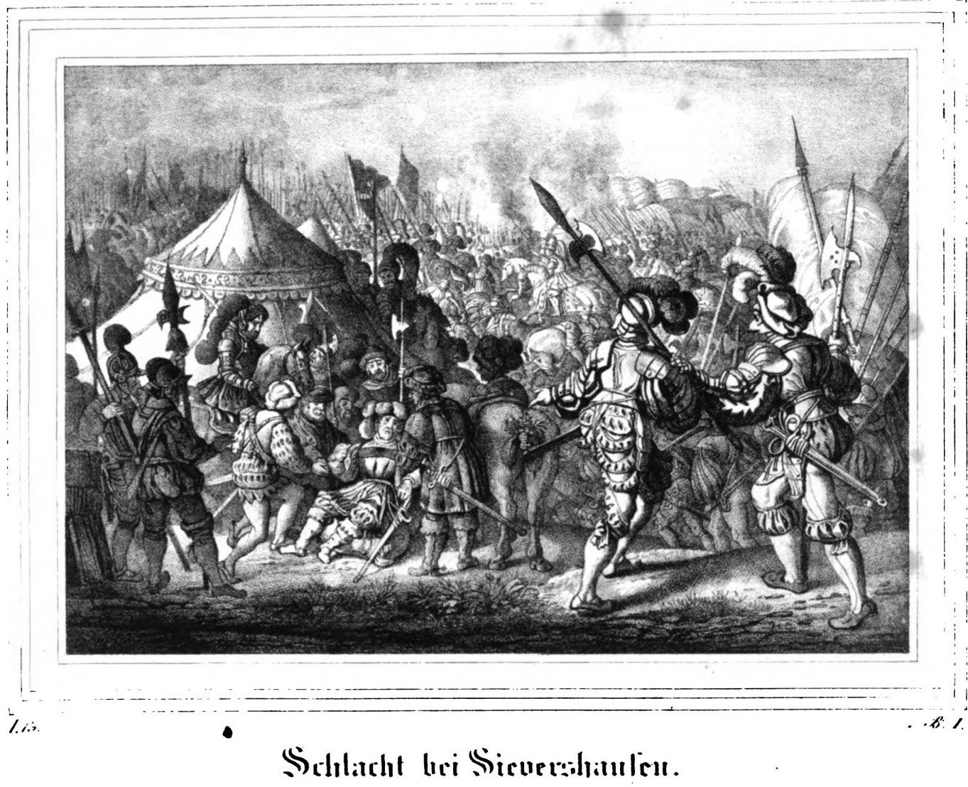 Schlacht bei Sievershausen in "Saxonia - Museum für sächsische Vaterlandskunde". Band 1. Dresden: Pietzsch und Comp. Siehe File:Saxonia Museum für saechsische Vaterlandskunde I.djvu